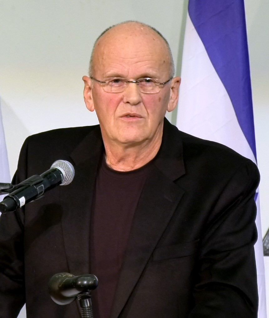 האלוף (במיל') זאבי פרקש נואם בפני צוערי בה"ד 1 על סא"ל עמנואל מורנו, 2019 "קרדיט צילום: "רווח הפקות